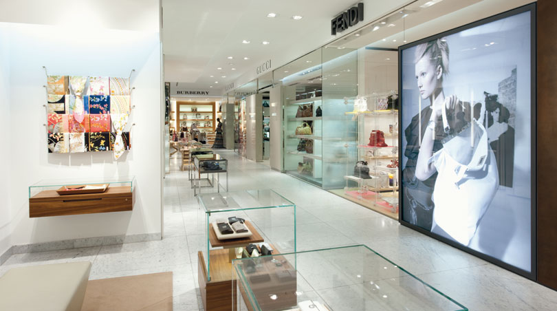 ТД "Бройнингер", г. Штуттгарт